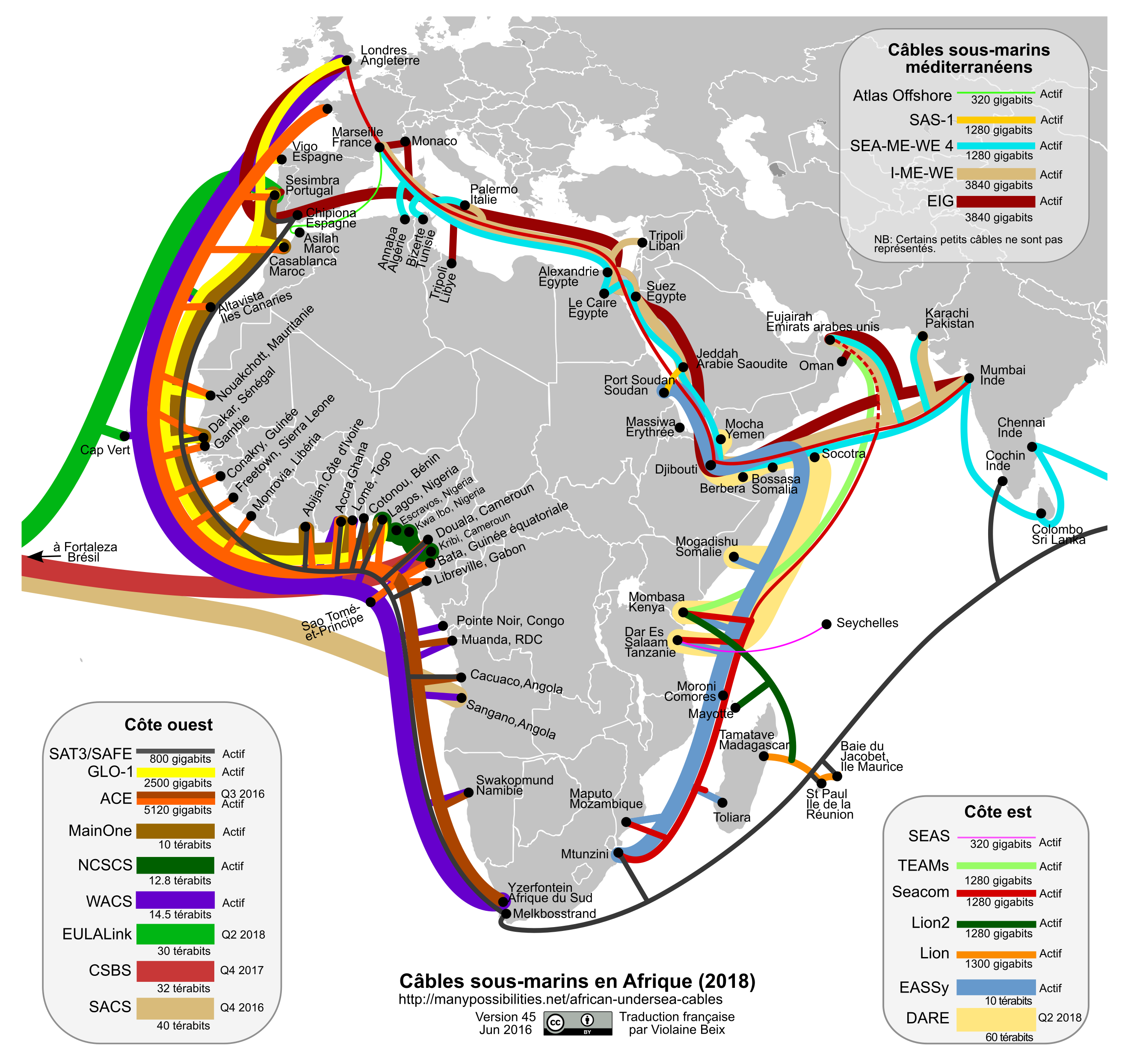 version 45 avec légendes en français de la carte des câbles sous-marins autour de l'Afrique